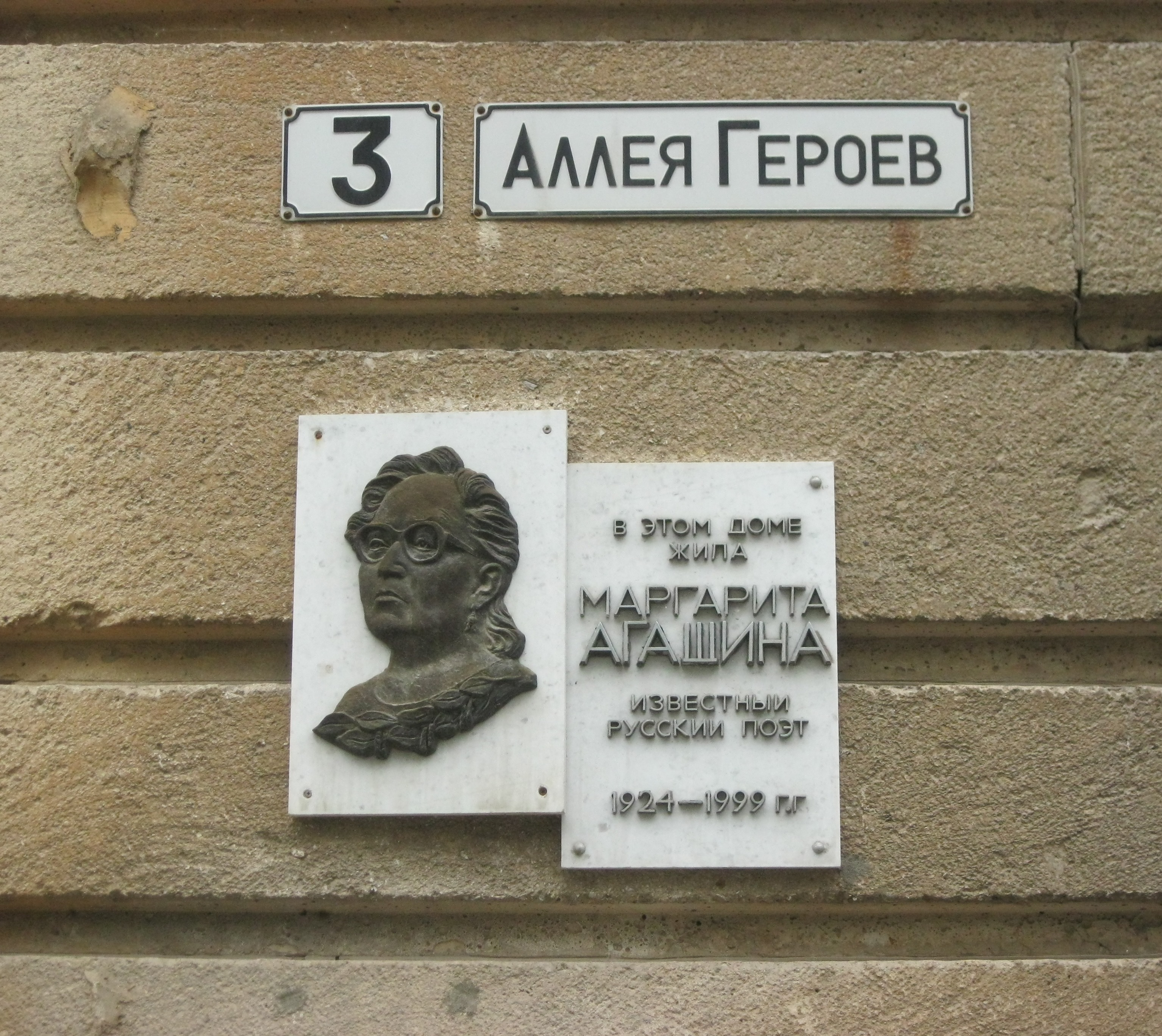 Мемориальная доска Маргариты Агашиной